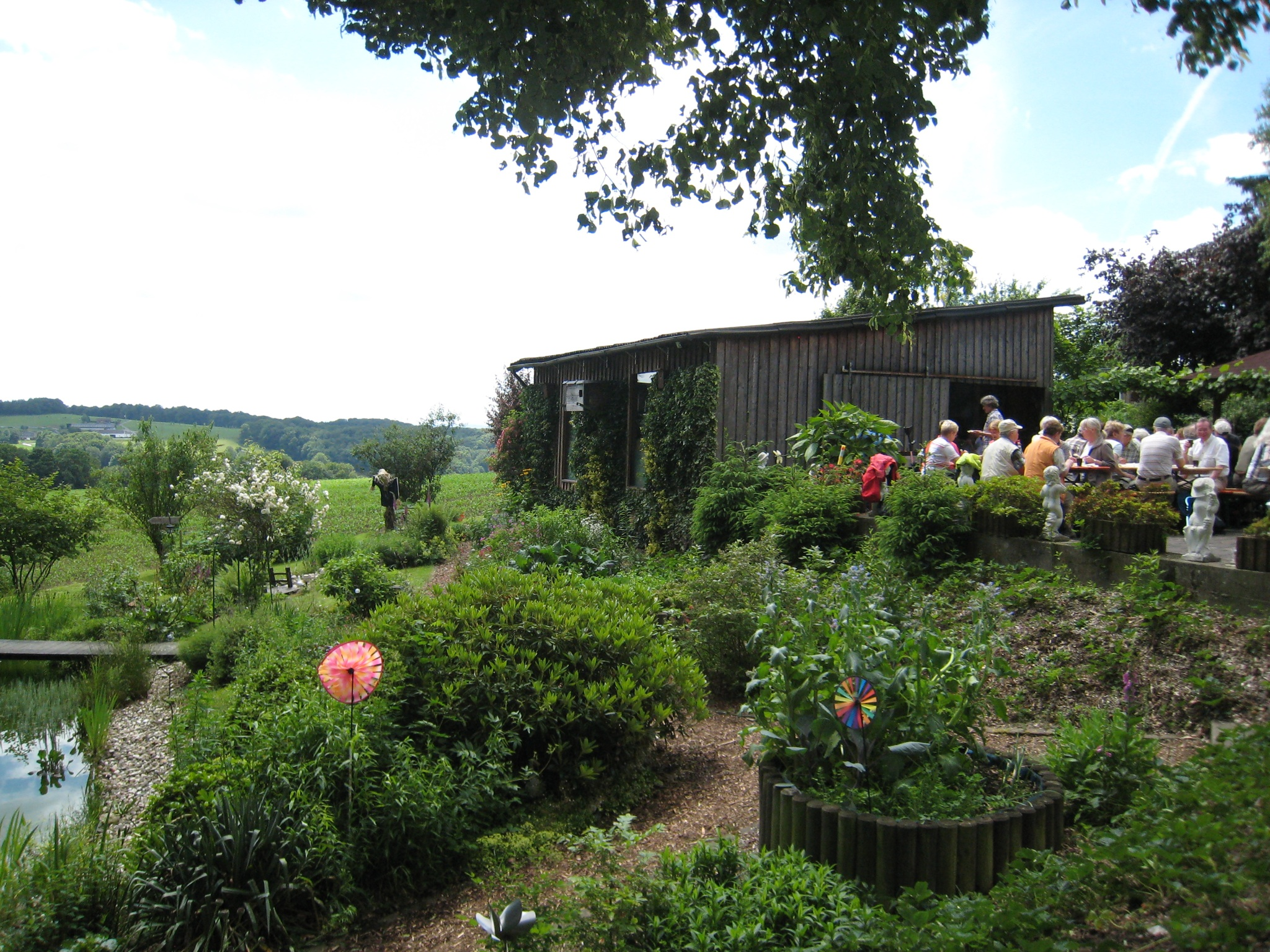 Tag der offenen Gartenpforte in Halzemich (Overath-Marialinden) bei Familie Röger